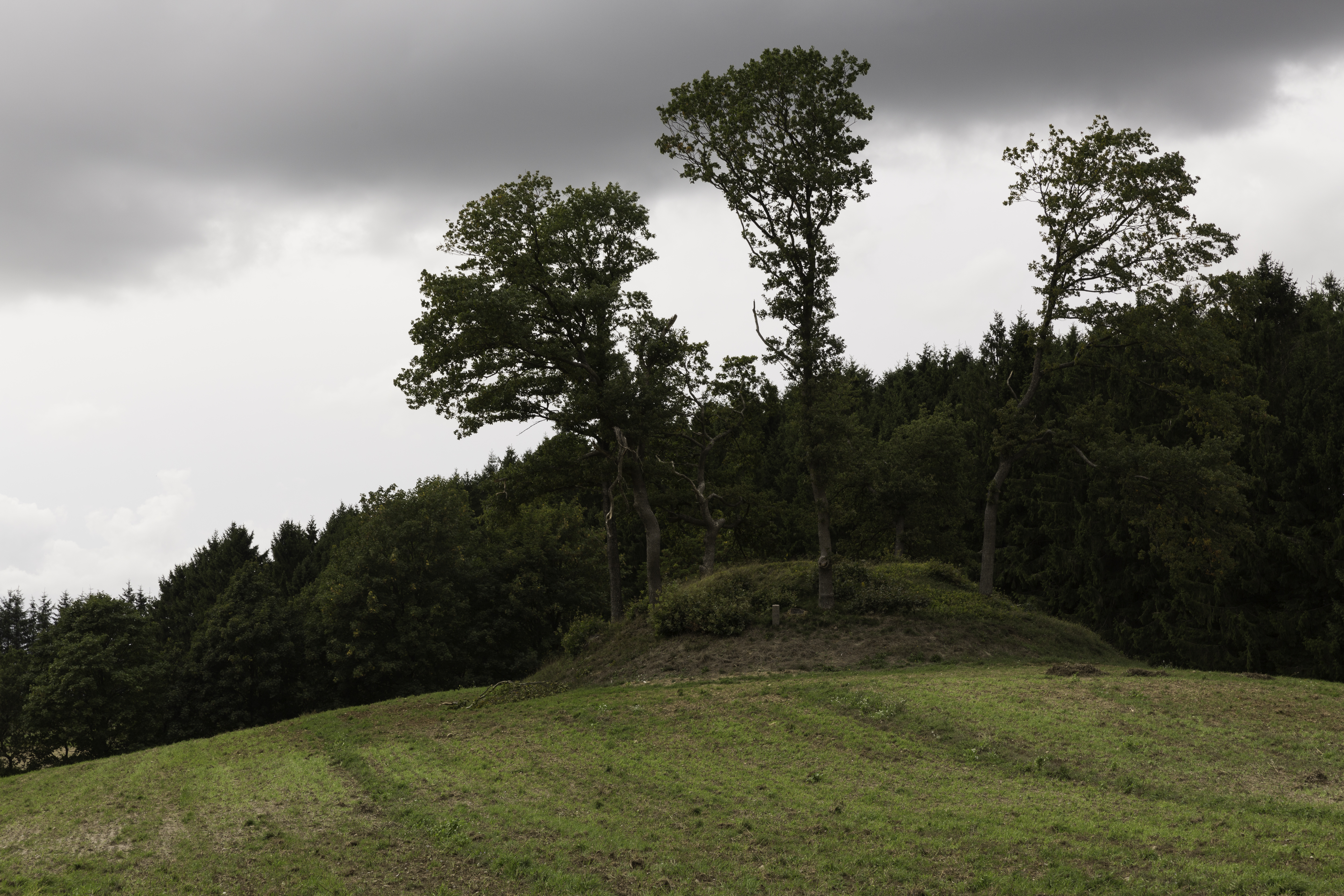 Nørre Snede gravhøj 54121